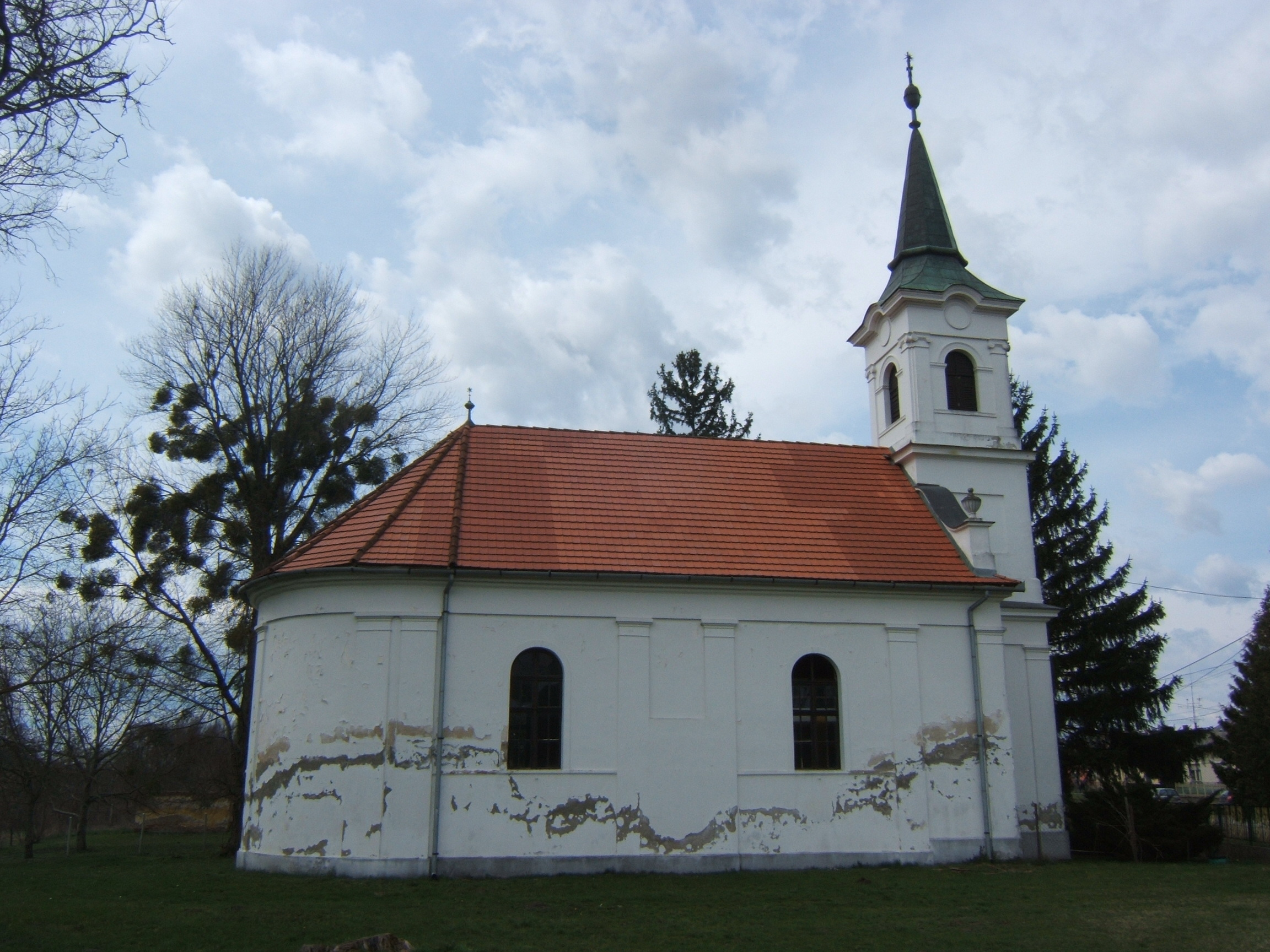 Szenta, református templom